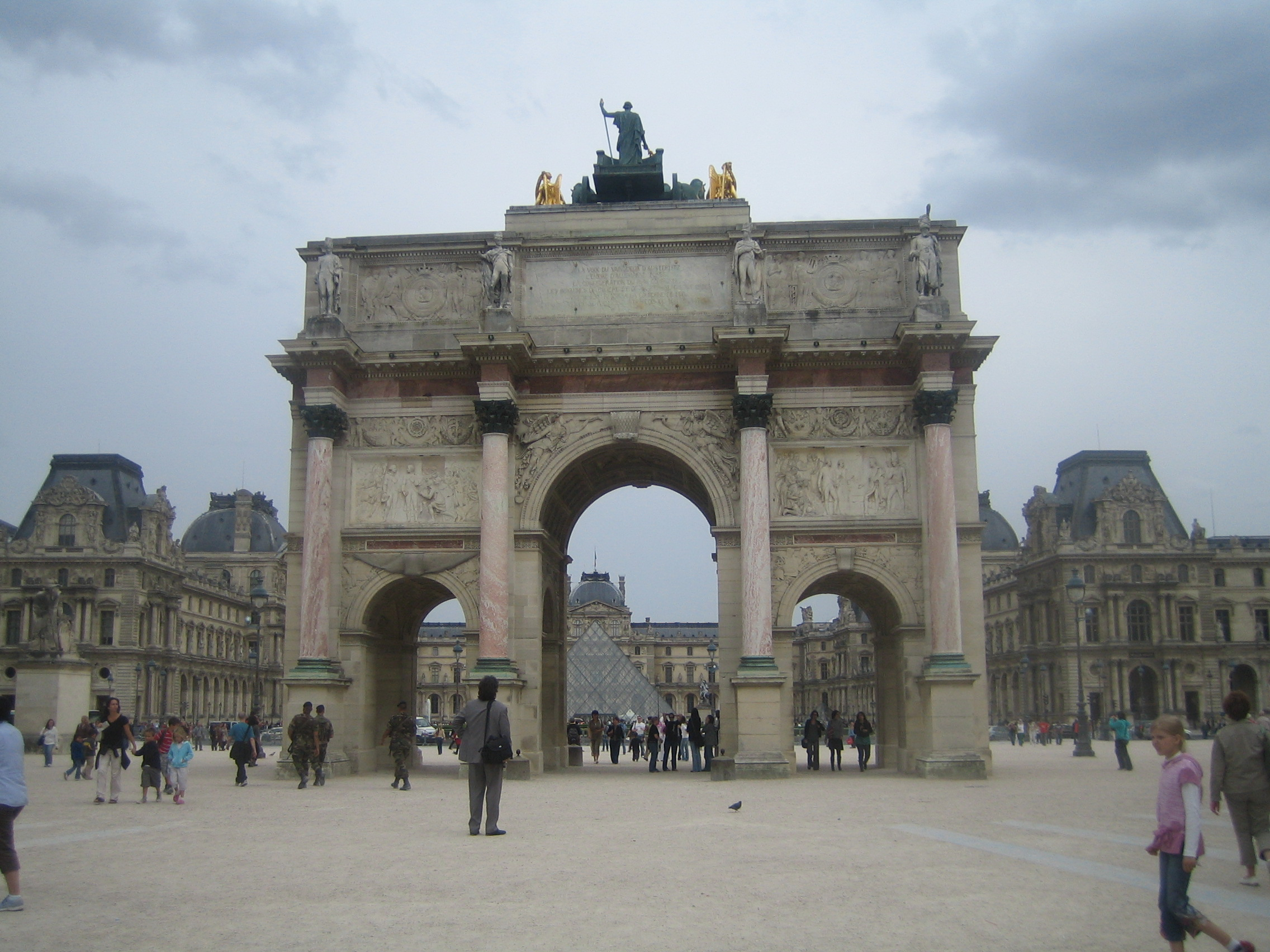 L'arc de triomphe du Caroussel, façade ouest, à Paris.